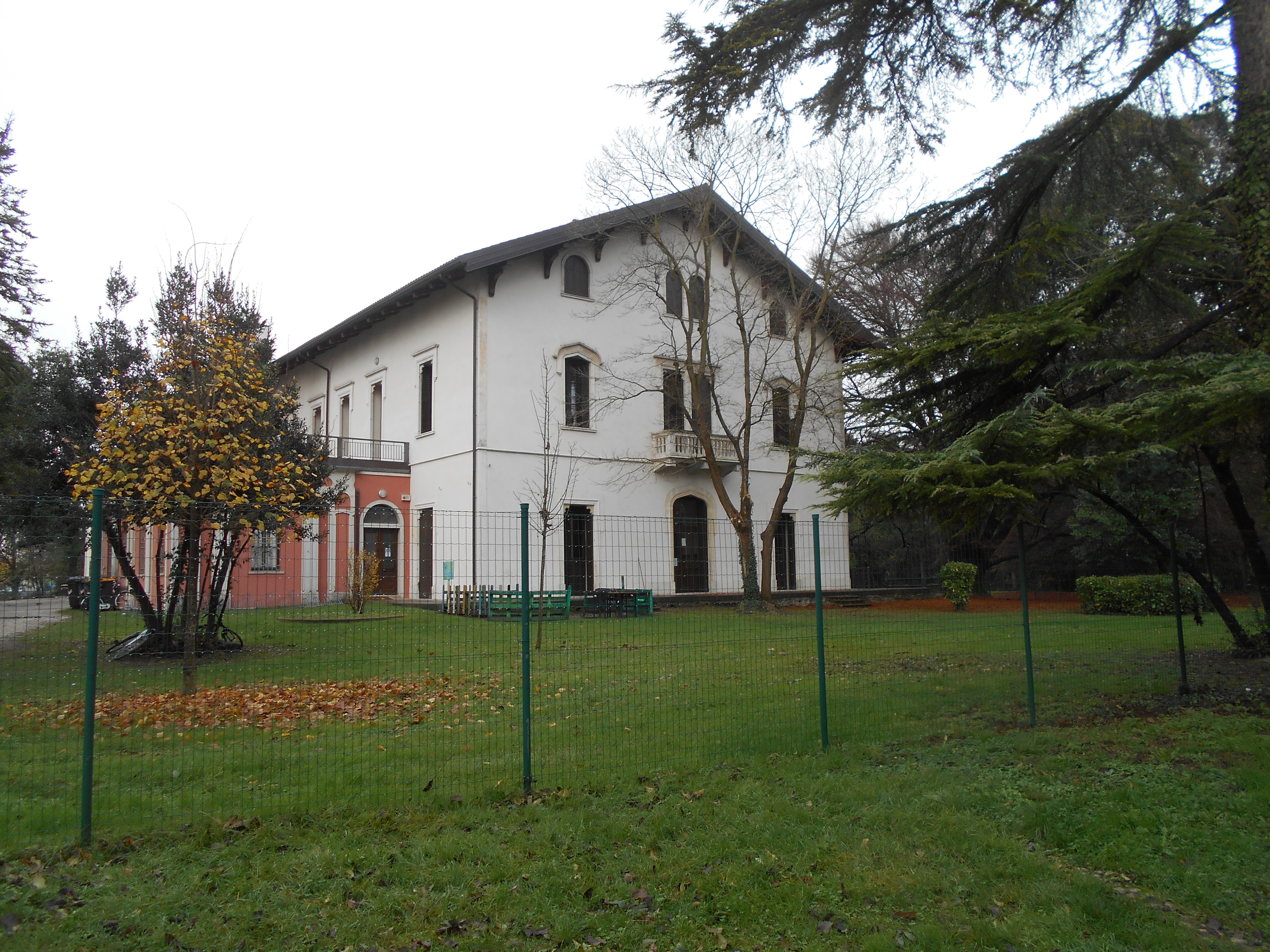 Scuola Stefanini di Voltabarozzo